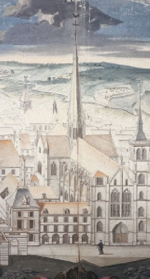 Sainte-Chapelle du palais des ducs de Bourgogne (détail d'une vue du palais en 1688). Paris, bibliothèque de la Sorbonne.